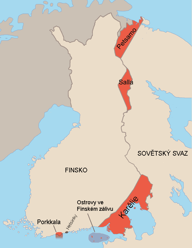 Mapa finsko-ruské hranice po Pařížském míru.